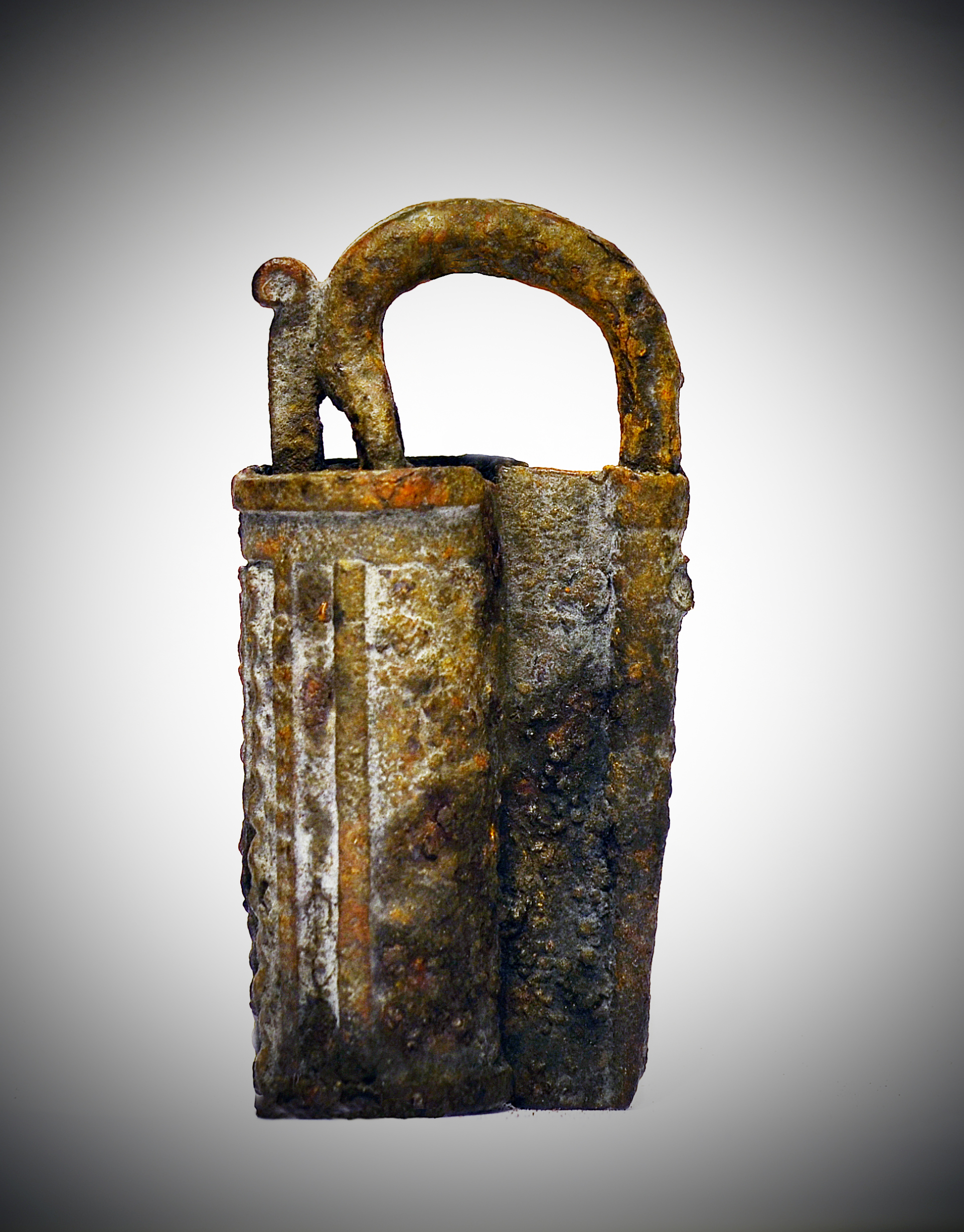 Замок навесной,Рязанское княжество,13 век.